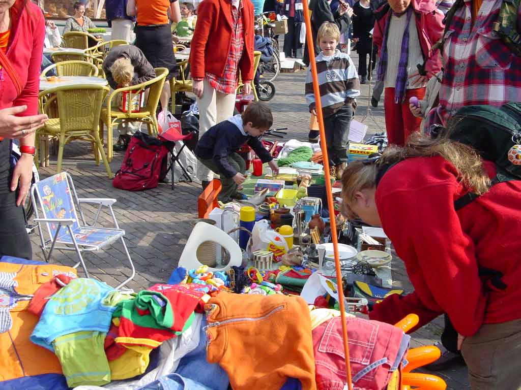 Market on Queen's Day in Deventer, Netherlands.